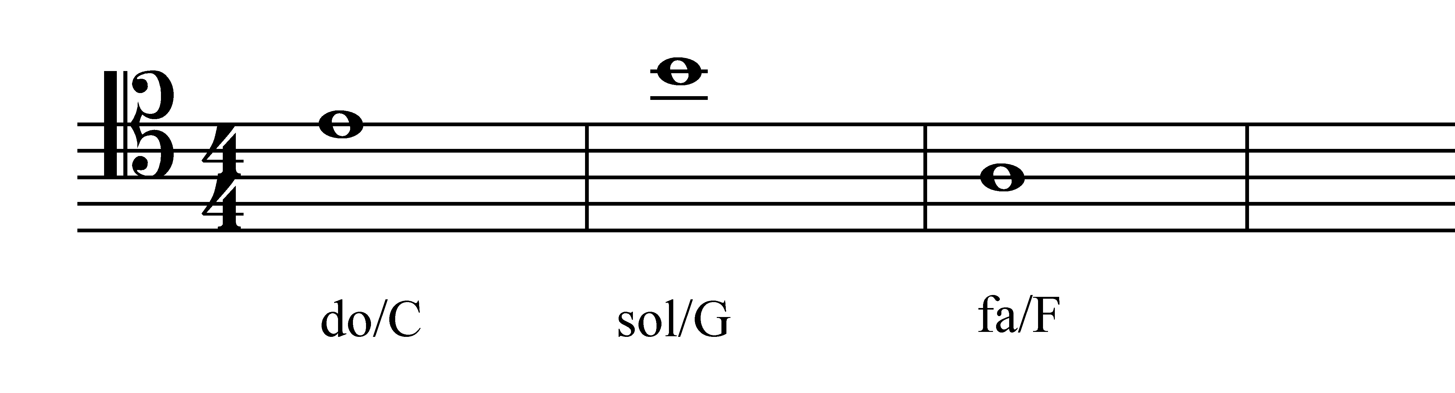 Baritonsleutel met c-sleutel. Eigen werk.